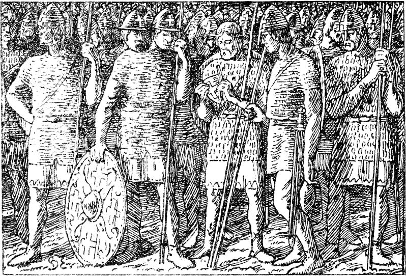 Halfdan Egedius: Illustration for Olav den helliges saga. Snorre 1899-edition. «Kong Olavs Hær.» nb: «Skaldene kveder for kong Olavs hær.» nn: «Skaldane kved for hæren til kong Olav.»